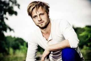 Christoph Letkowski ist ein deutscher Schauspieler. Bild von 2012.